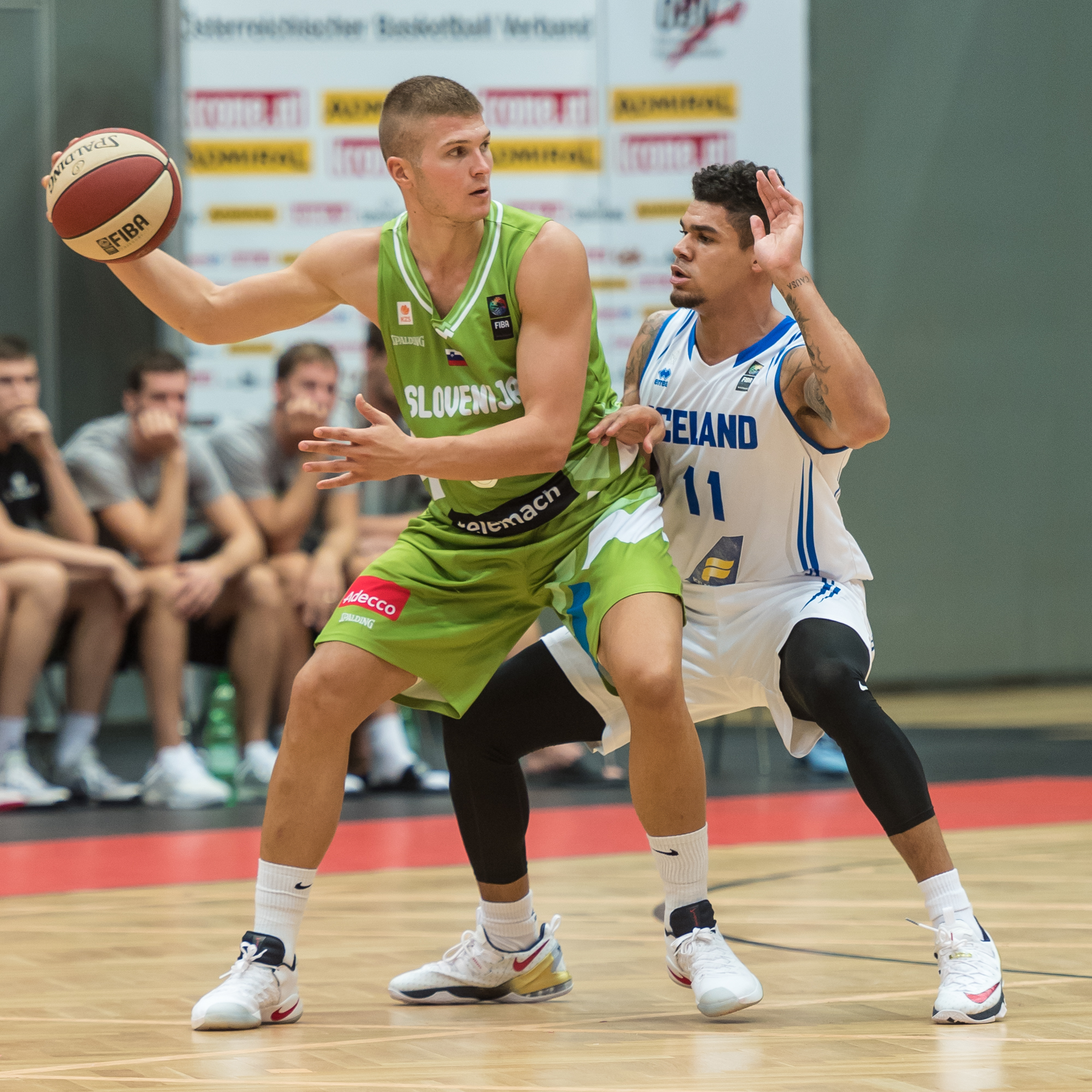 ÖBV Vier-Nationen-Turnier vom 12.-14. August 2016 in Schwechat - Island vs Slowenien. Bild zeigt Edo Muric (SLO) und Kristofer Acox (ISL).